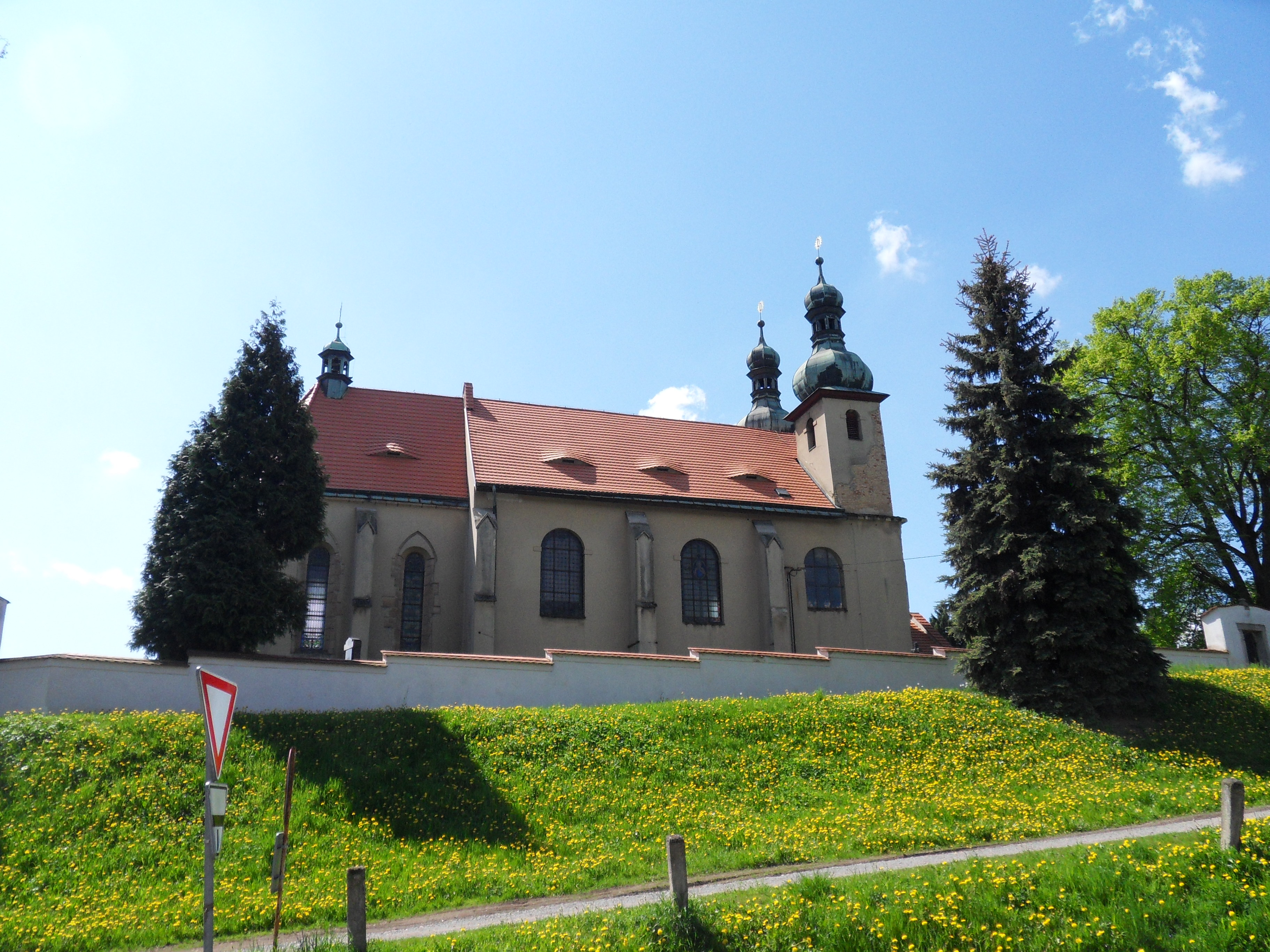 Kostel sv. Šimona a Judy, Dýšina, okr.Plzeň-město